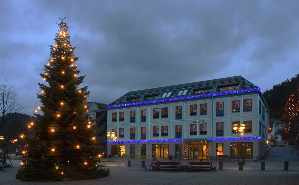 Rådhuset i Kvinesdal julen 2006, pyntet opp til landets største julekalender.